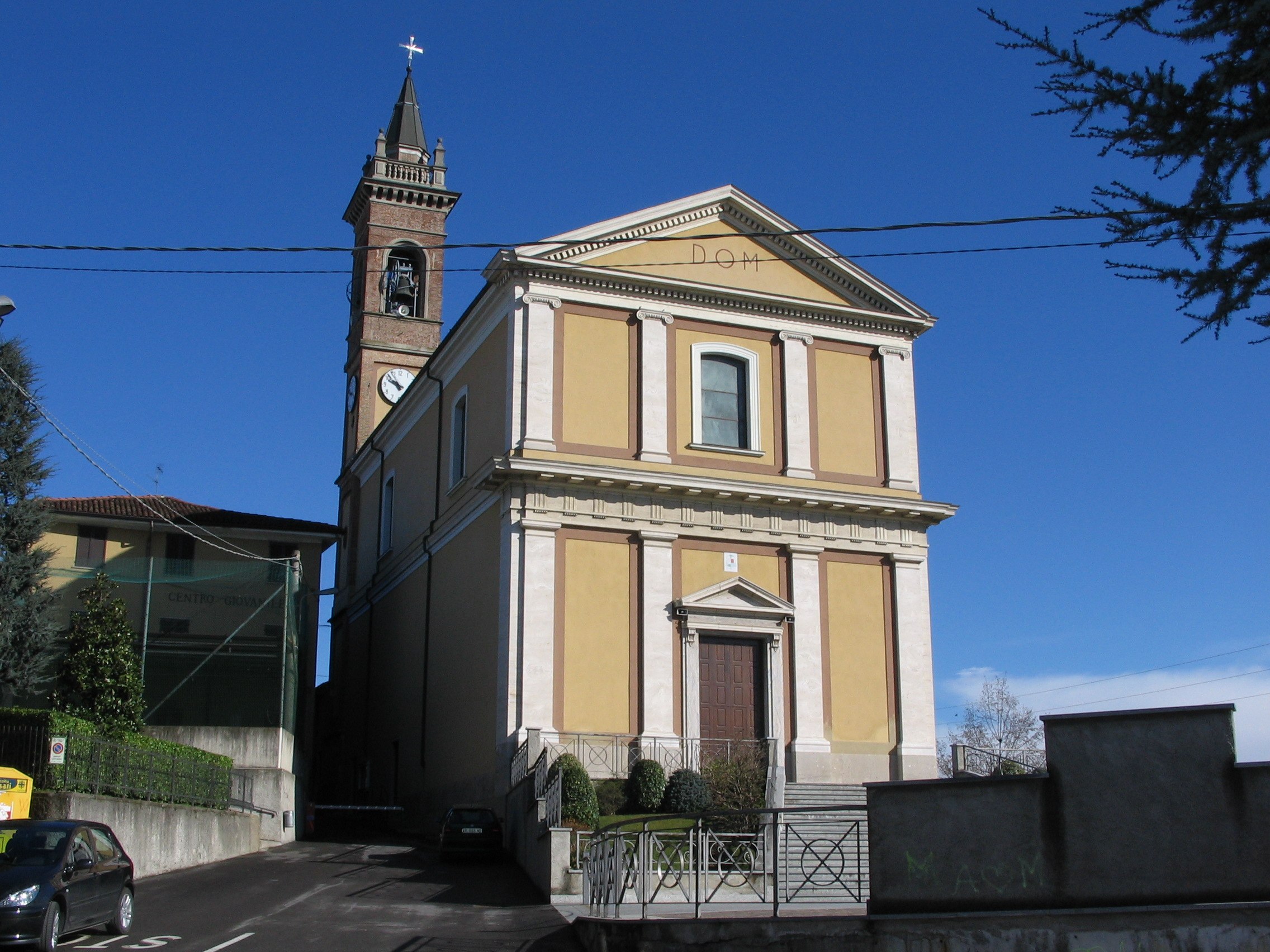 Autore Giorces. Filago, parrocchiale S. Maria Assunta e S. Rocco.